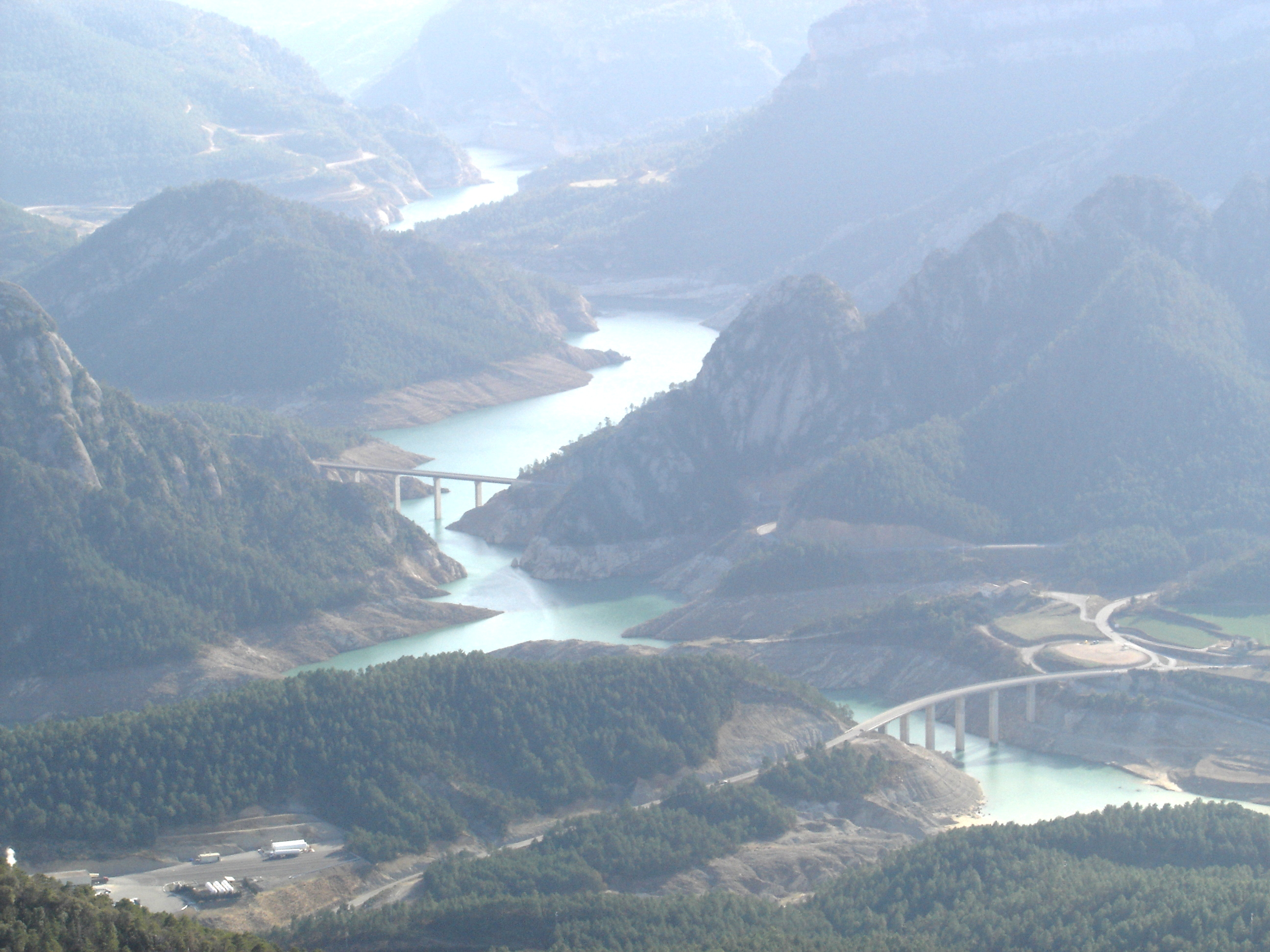 L'embassament de la Llosa del Cavall des de Cap de Balç. A primer terme, Aigüesjuntes= la confluència del Cardener (dreta de la foto) amb l'Aigua de Valls (esquerra de la foto). A la part superior de la foto, la Vall de Lord Jussana